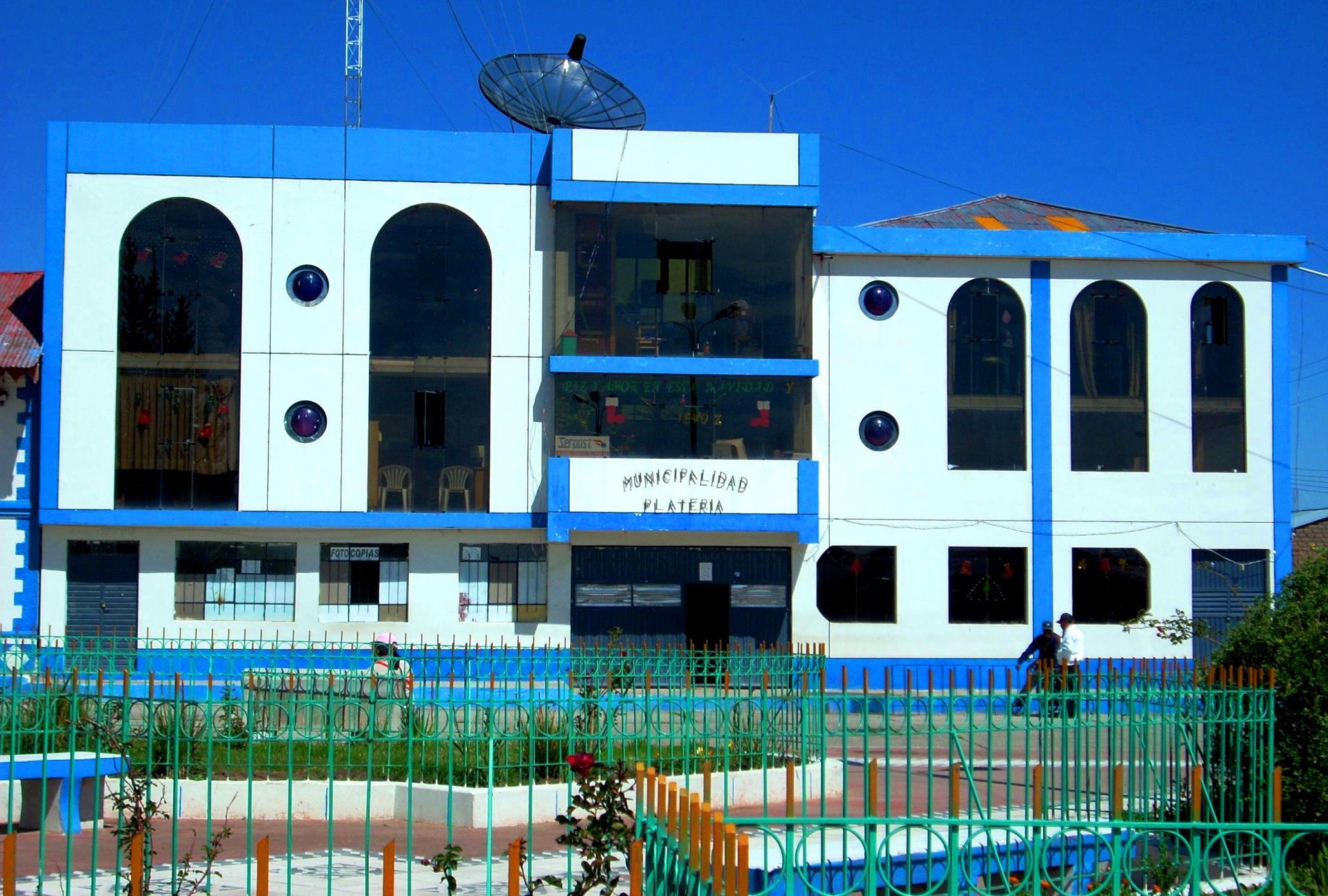 Vista frontal del edificio municipal de Plateria en Puno-Peru